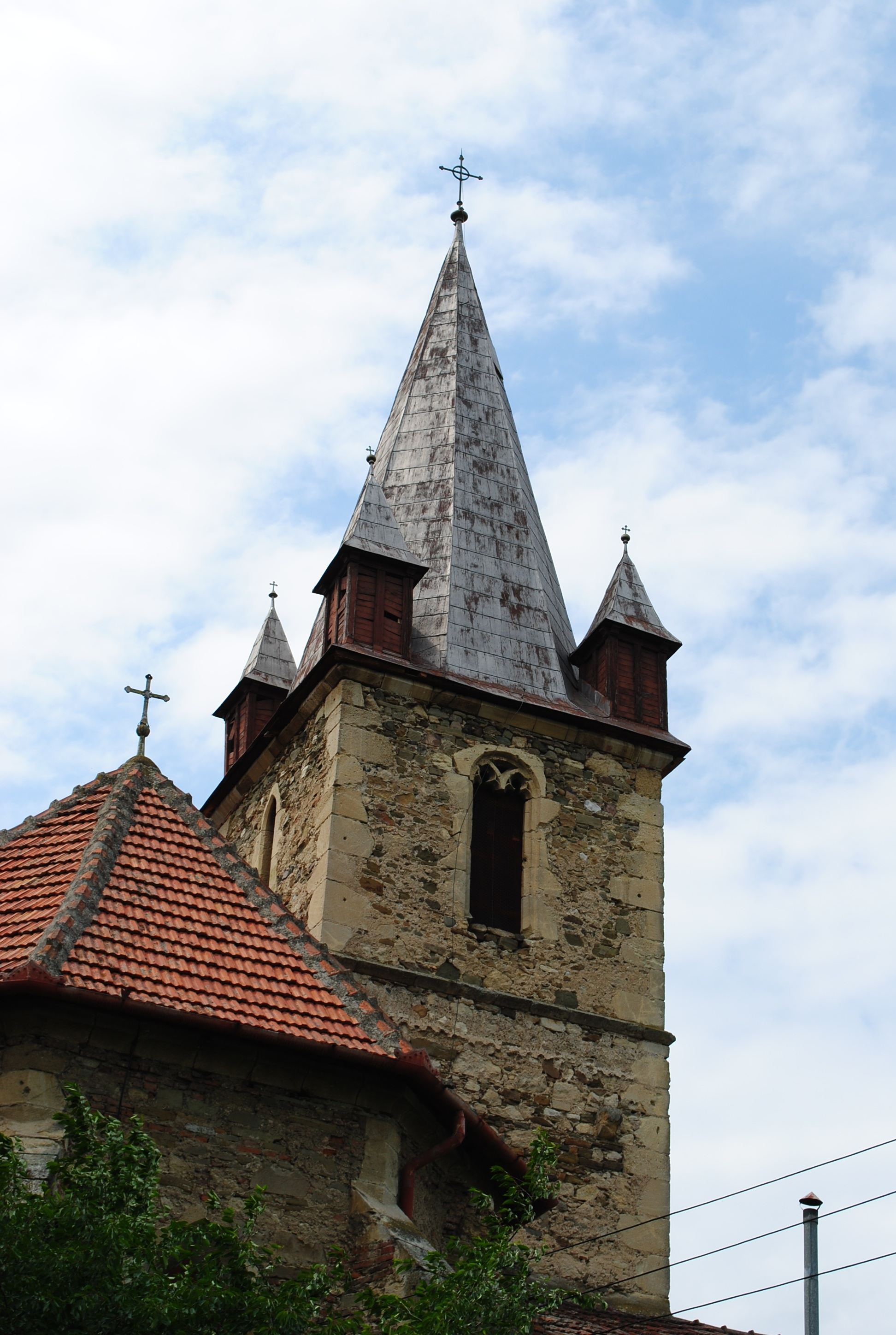 Biserică, sec. XV - XVIII 01